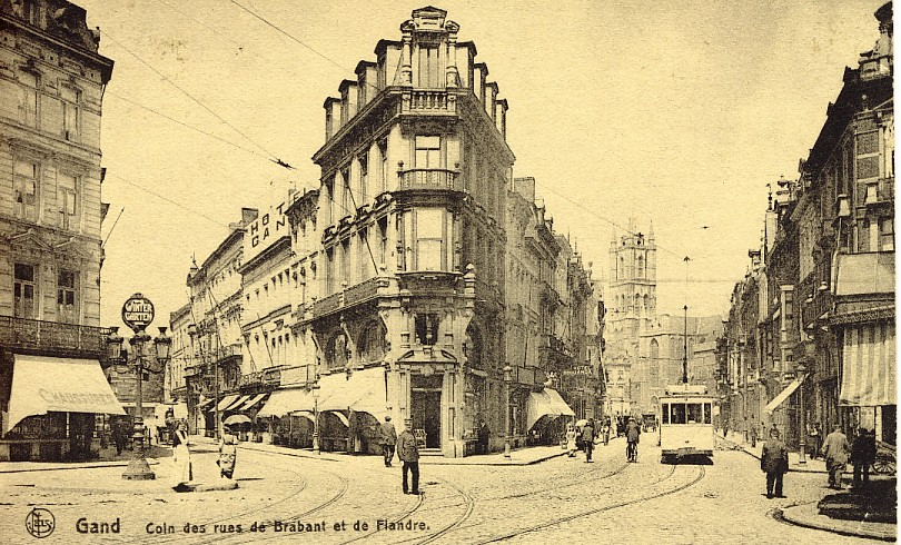 Vlaanderstraat gent begin van de eeuw